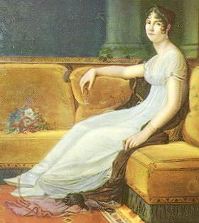 Madame Bonaparte at Malmaison (Gérard)